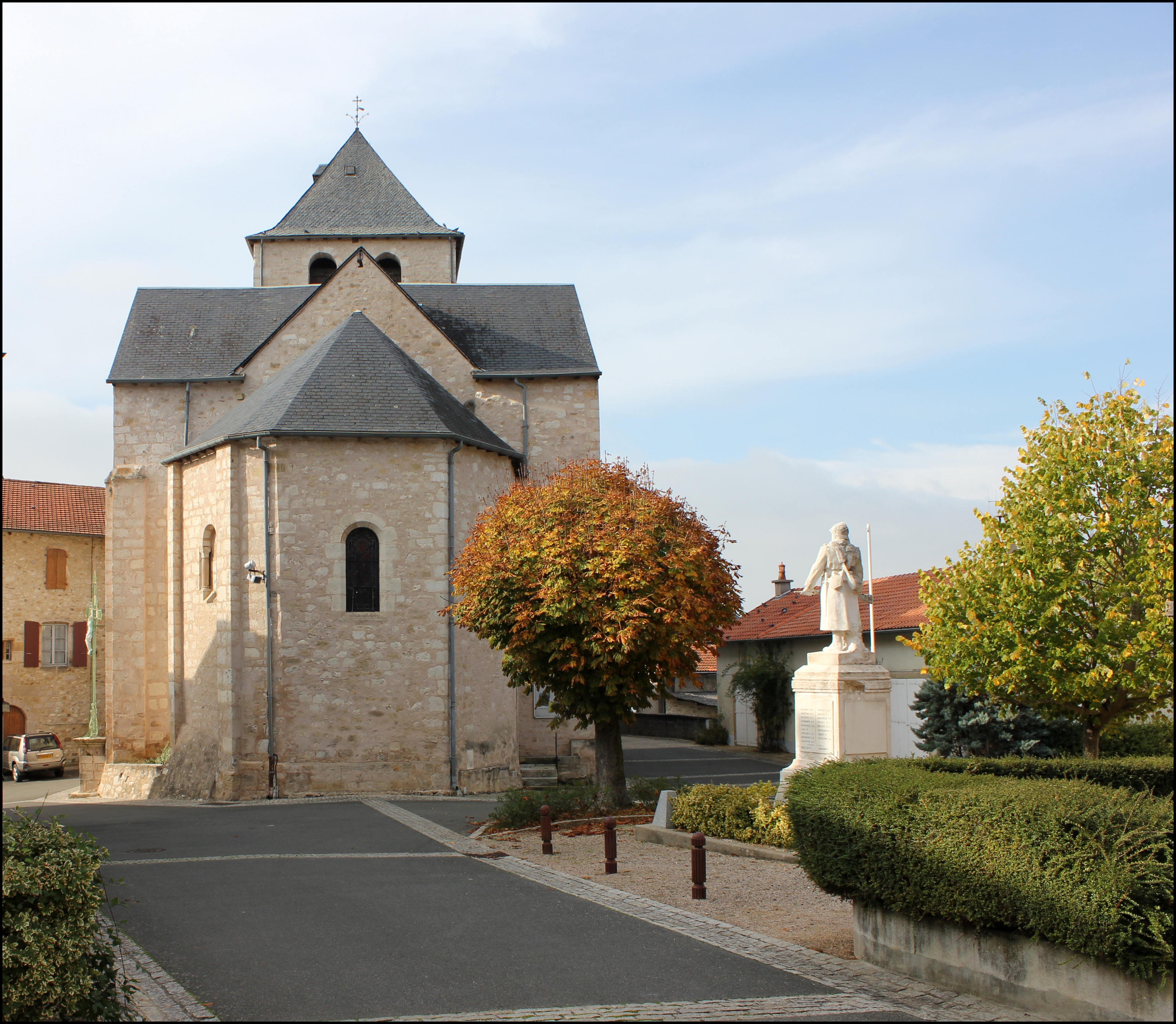 Asprières